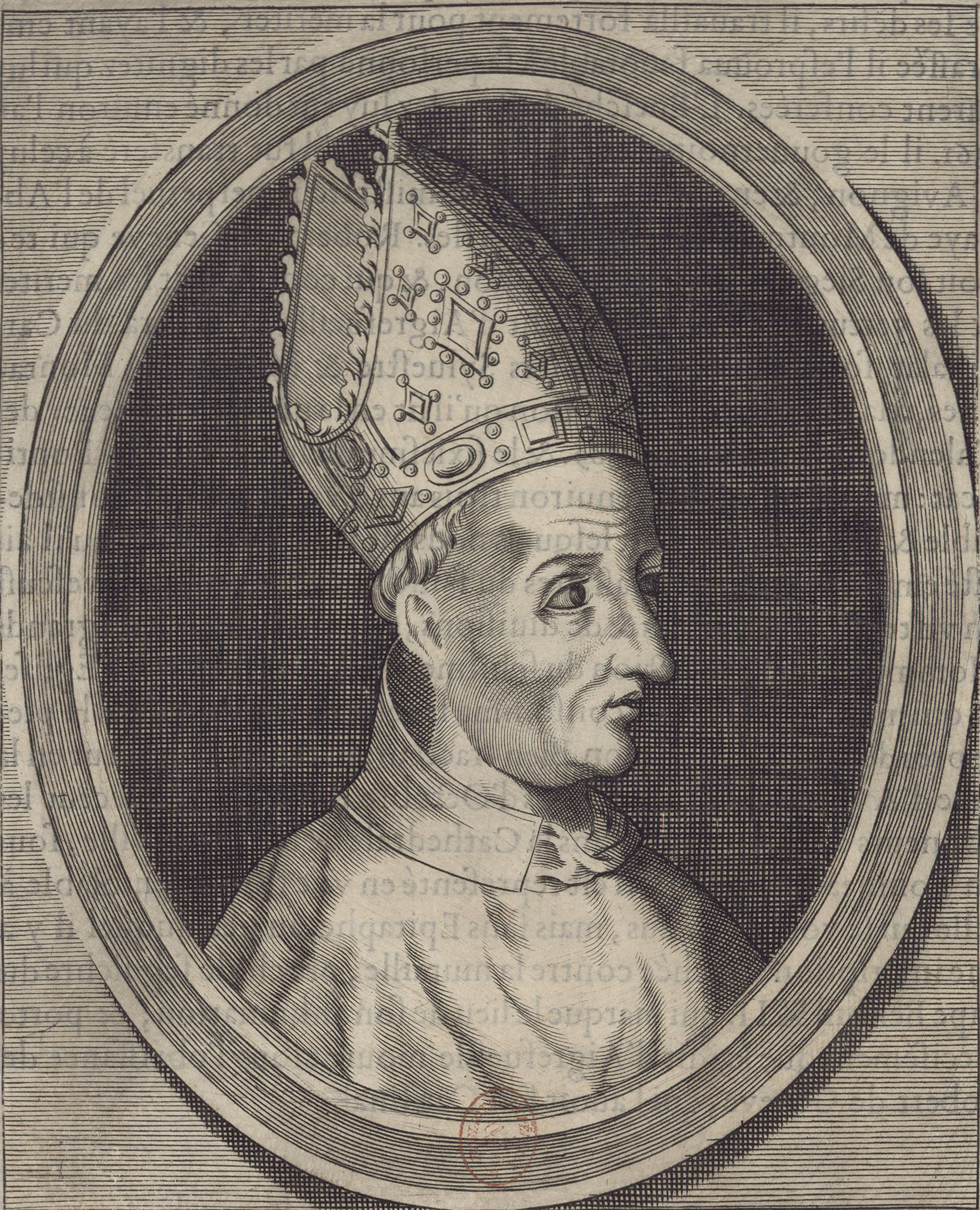 Cardinal Faydit d'Aigrefeuille